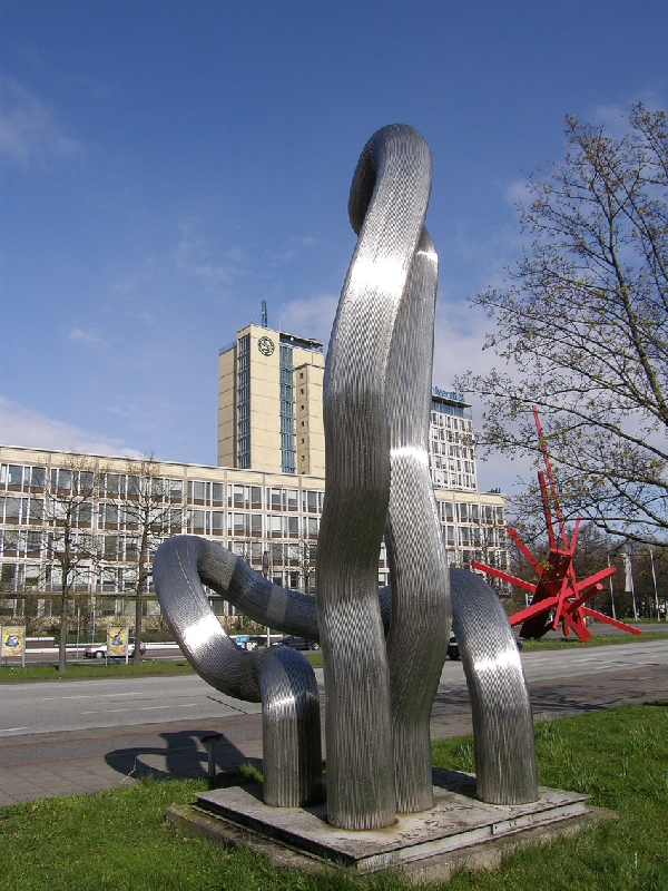 Der Königsworther Platz in Hannover